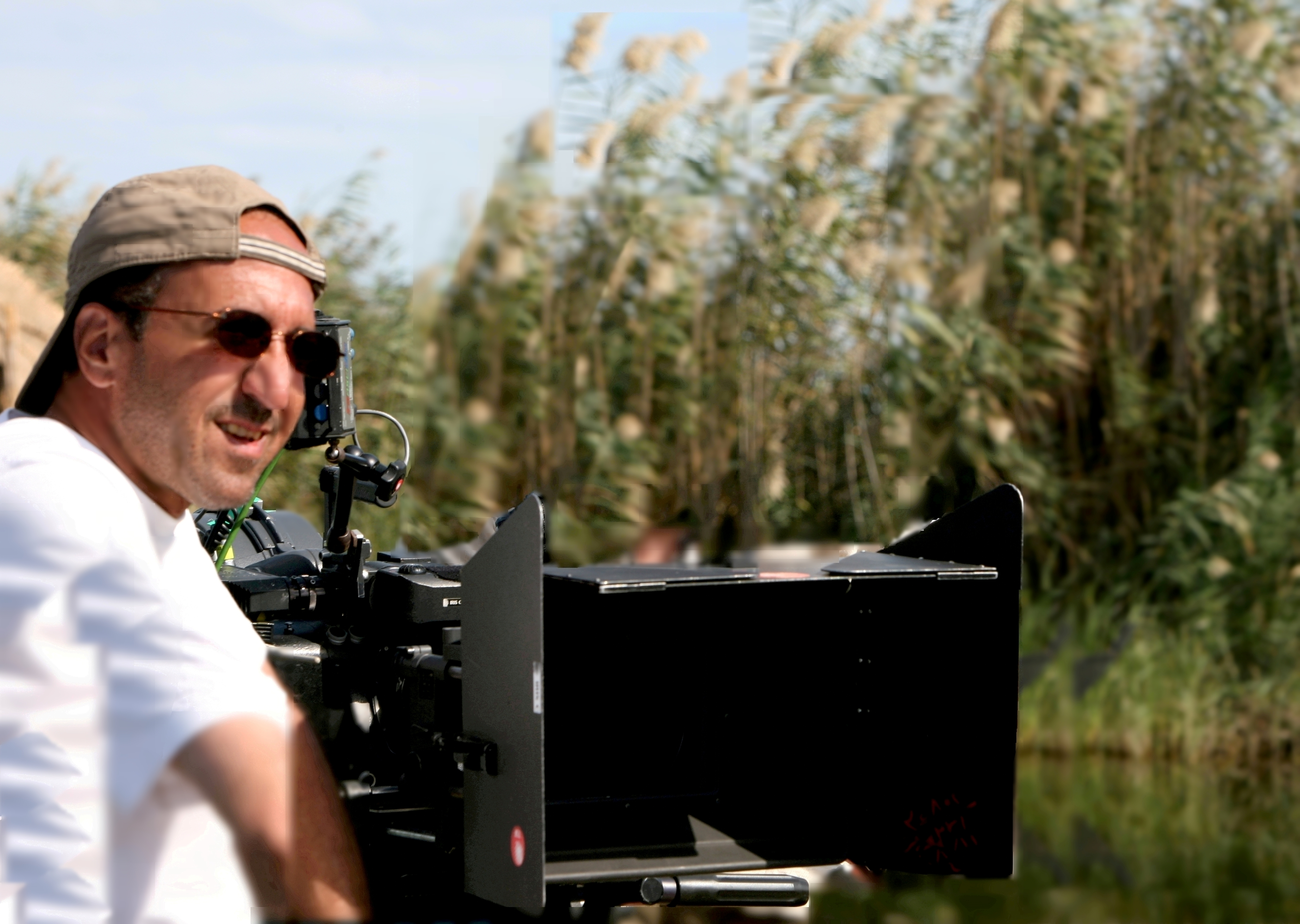 Abbas Fahdel sur le tournage de L'Aube du monde en novembre 2007.